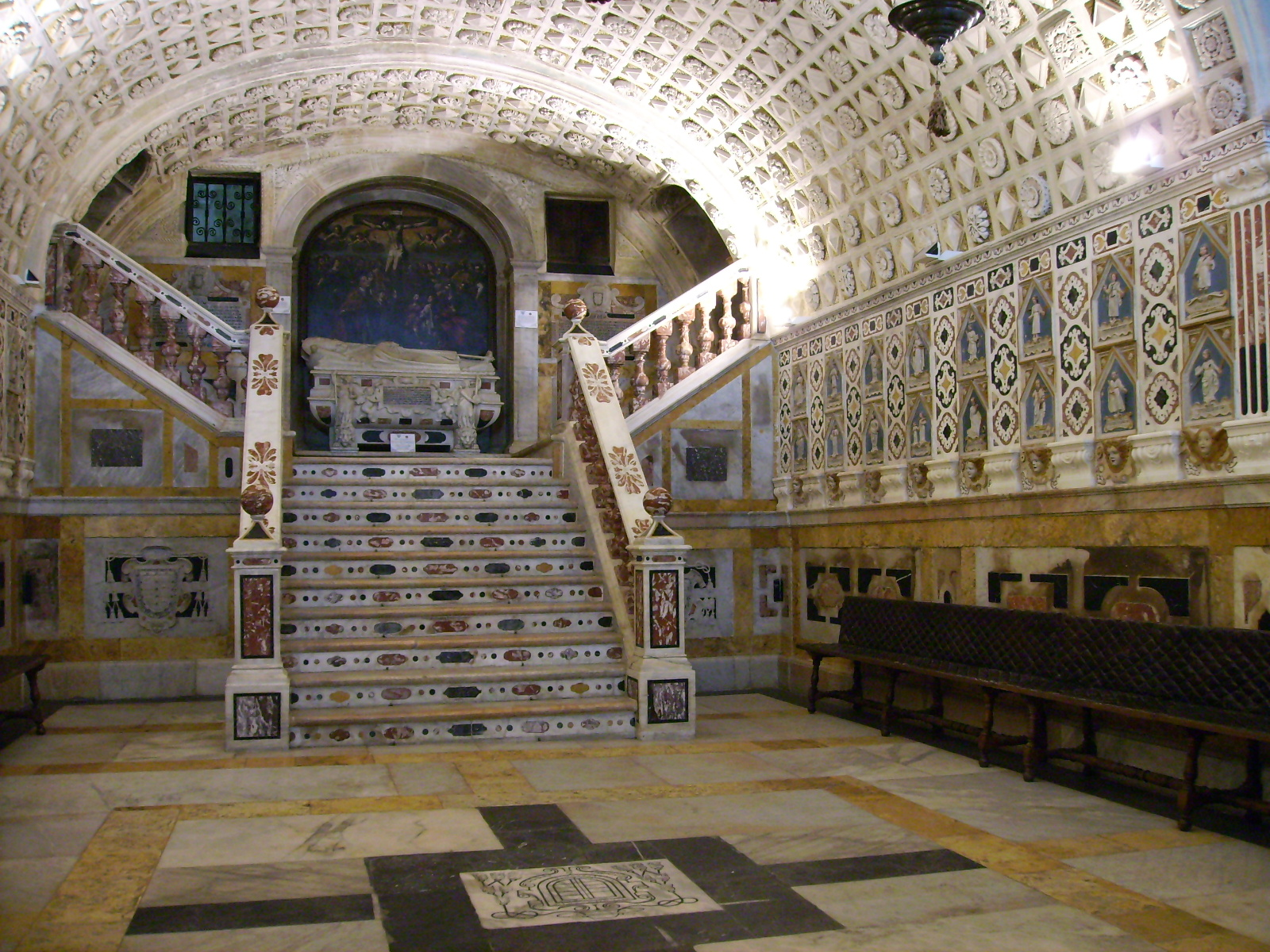 Krypta der Kathedrale Santa Maria, Cagliari, Sardinien